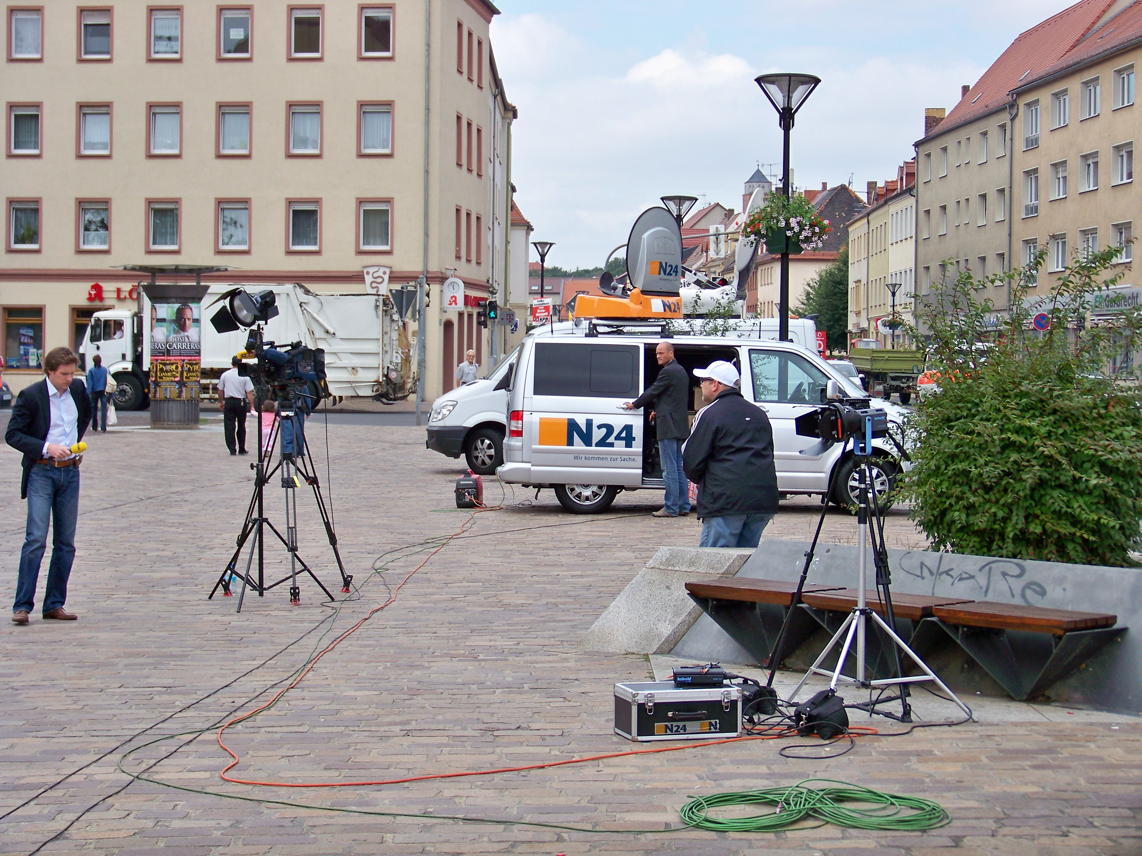 Übertragungswagen der ProsiebenSat.1-Gruppe (vertreten durch N24) sowie der RTL-Gruppe in Eilenburg, links ein RTL-Reporter, am N24-Fahrzeug der N24-Reporter Steffen Schwarzkopf